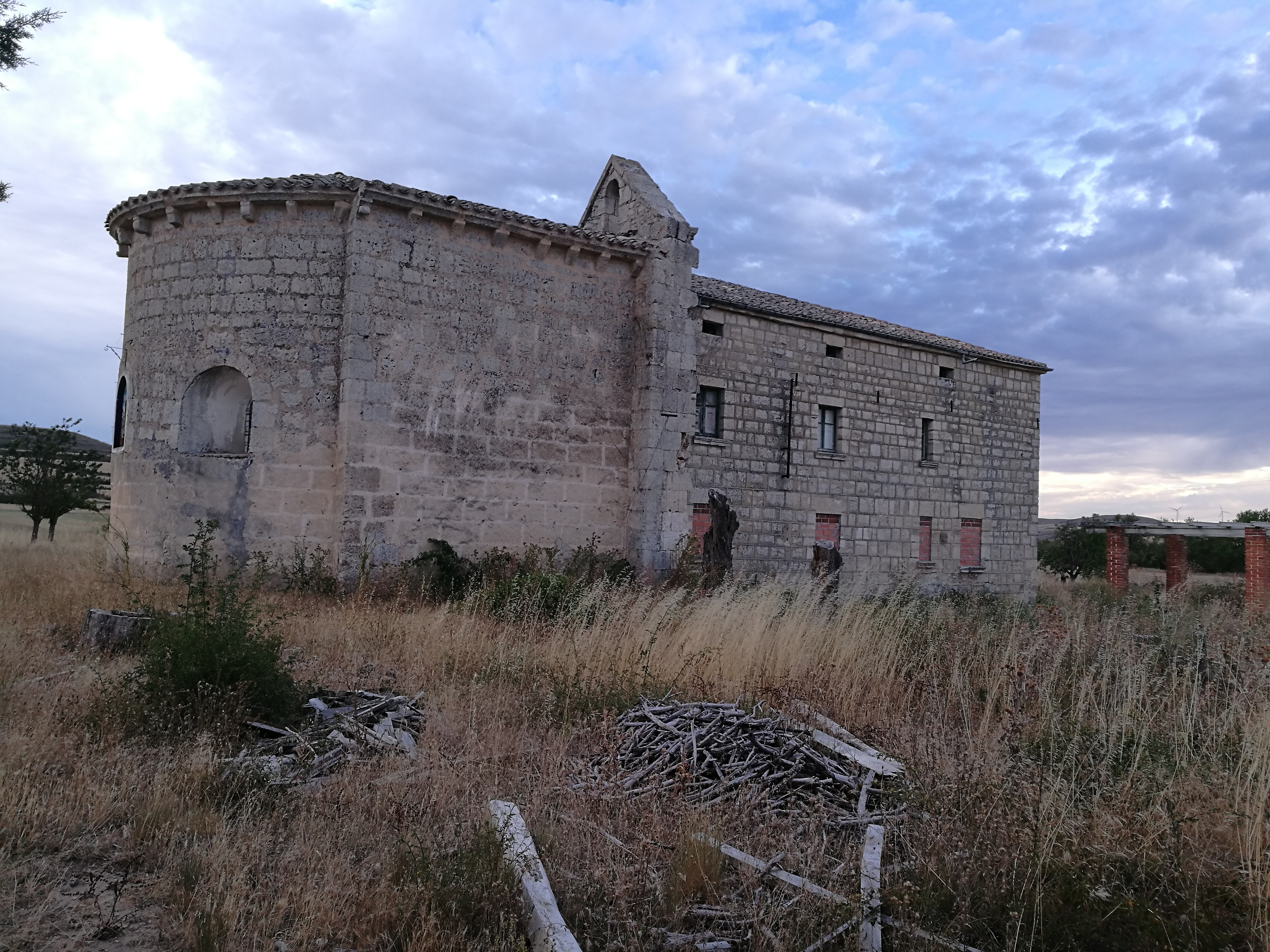 Villandiego, La rosaleda de san Nicolás (iglesia)